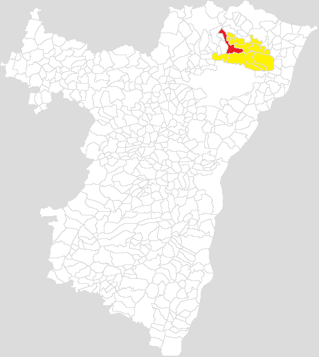 Communauté de communes de l'outre forêt